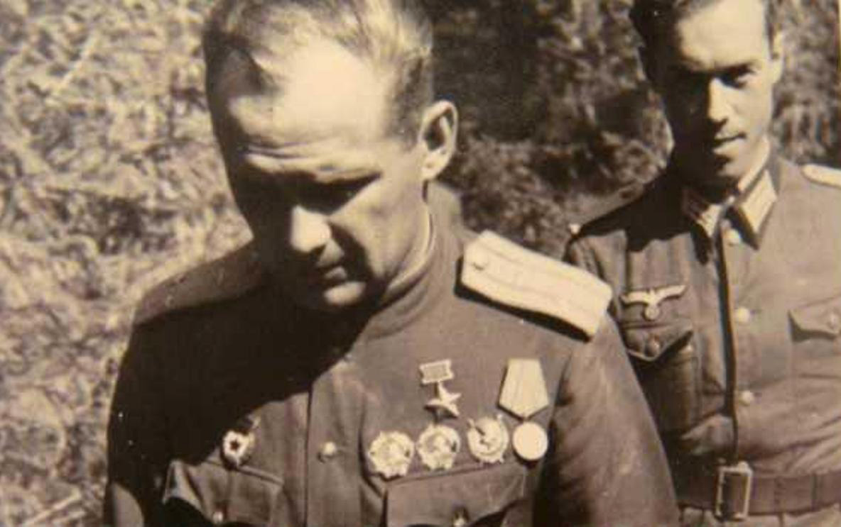 Герой Советского Союза лётчик Власов Николай Иванович в плену. 1943 год